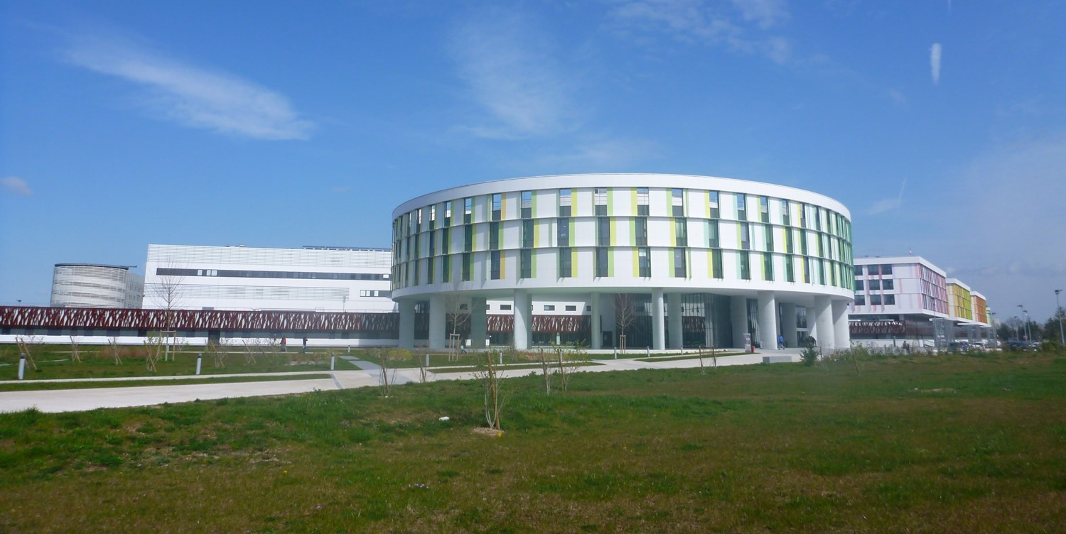 Vue extérieure du centre hospitalier régional d'Orléans (nouvel hôpital d'Orléans).